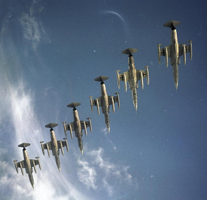 Marinefliegergeschwader 1 M FL. G1 Geschwader Jagel [bei Schleswig] Marine F104G (Starfighter)